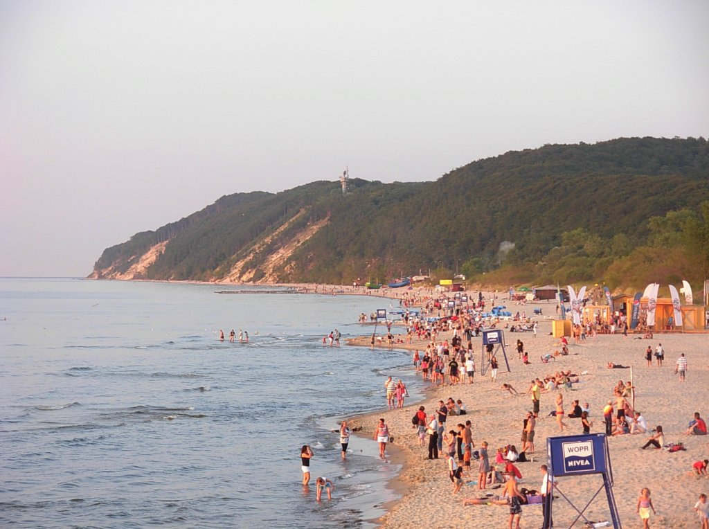 Plaża w Międzyzdrojach